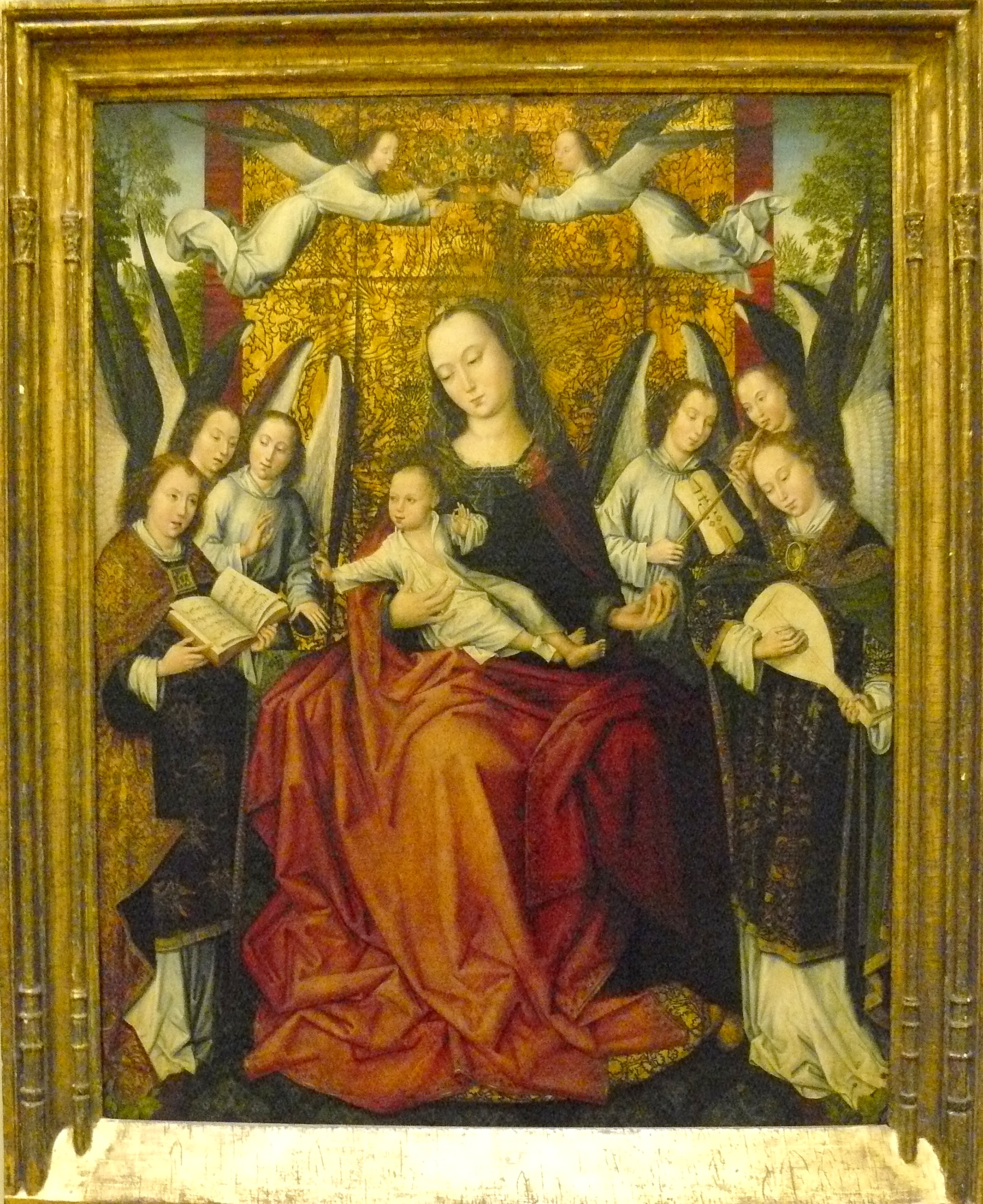 Vierge et l'Enfant entourés d'anges, tableau du Maître du feuillage en broderie (actif à Bruxelles vers 1500) - Musée du Louvre, n° Inv RF 1973-35 Les anges chantent un motet composé vers 1470 par Walter Frye dont ont peut voir la partition sur la droite. Ce tableau pourrait être la partie centrale d'un triptyque dont les deux autres volets, une Sainte Barbe et une Sainte Catherine, sont conservés au musée Boijmans Van Beuningen de Rotterdam.